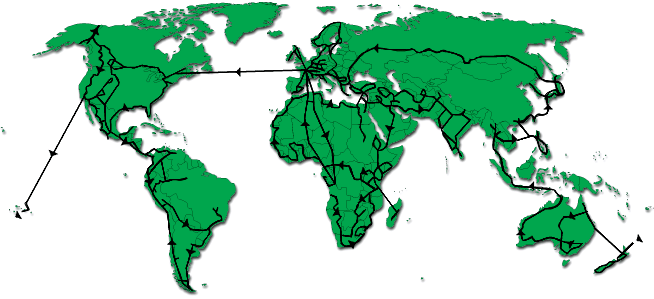 Carte du Tour du Monde en stop effectué par André Brugiroux de 1955 à nos jours